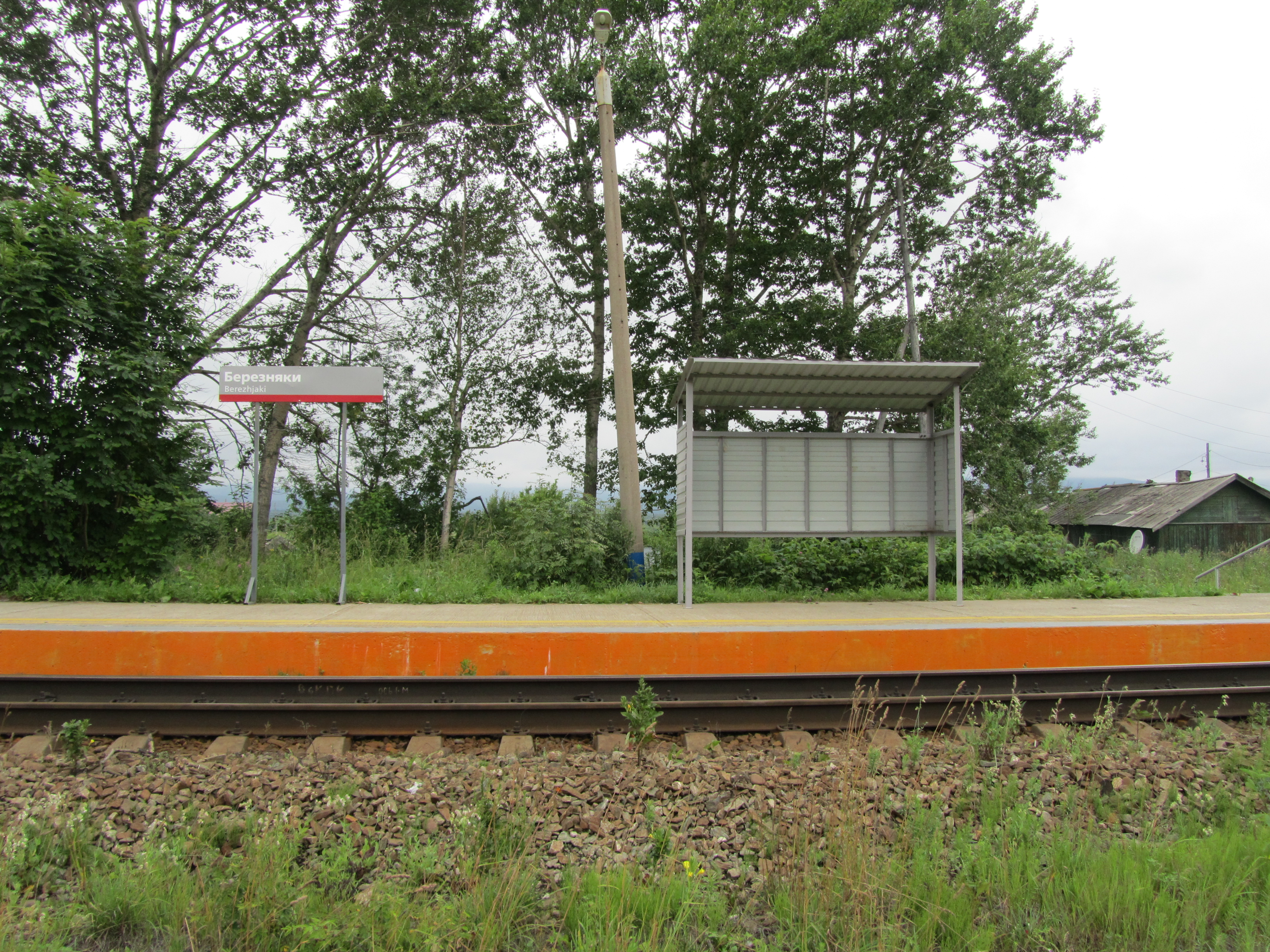 Сахалинский регион Дальневосточной железной дороги, станция Брезняки